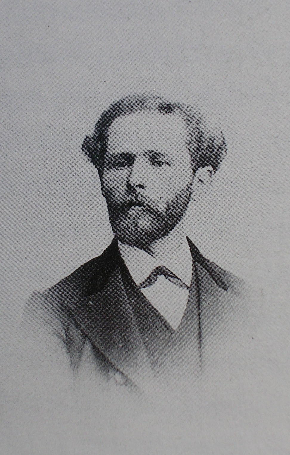 Félix Arnaudin, poète, photographe et écrivain français. Portrait par Alphonse Terpereau.